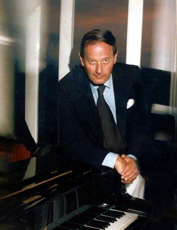 Paco Mañosa, pianista de jazz